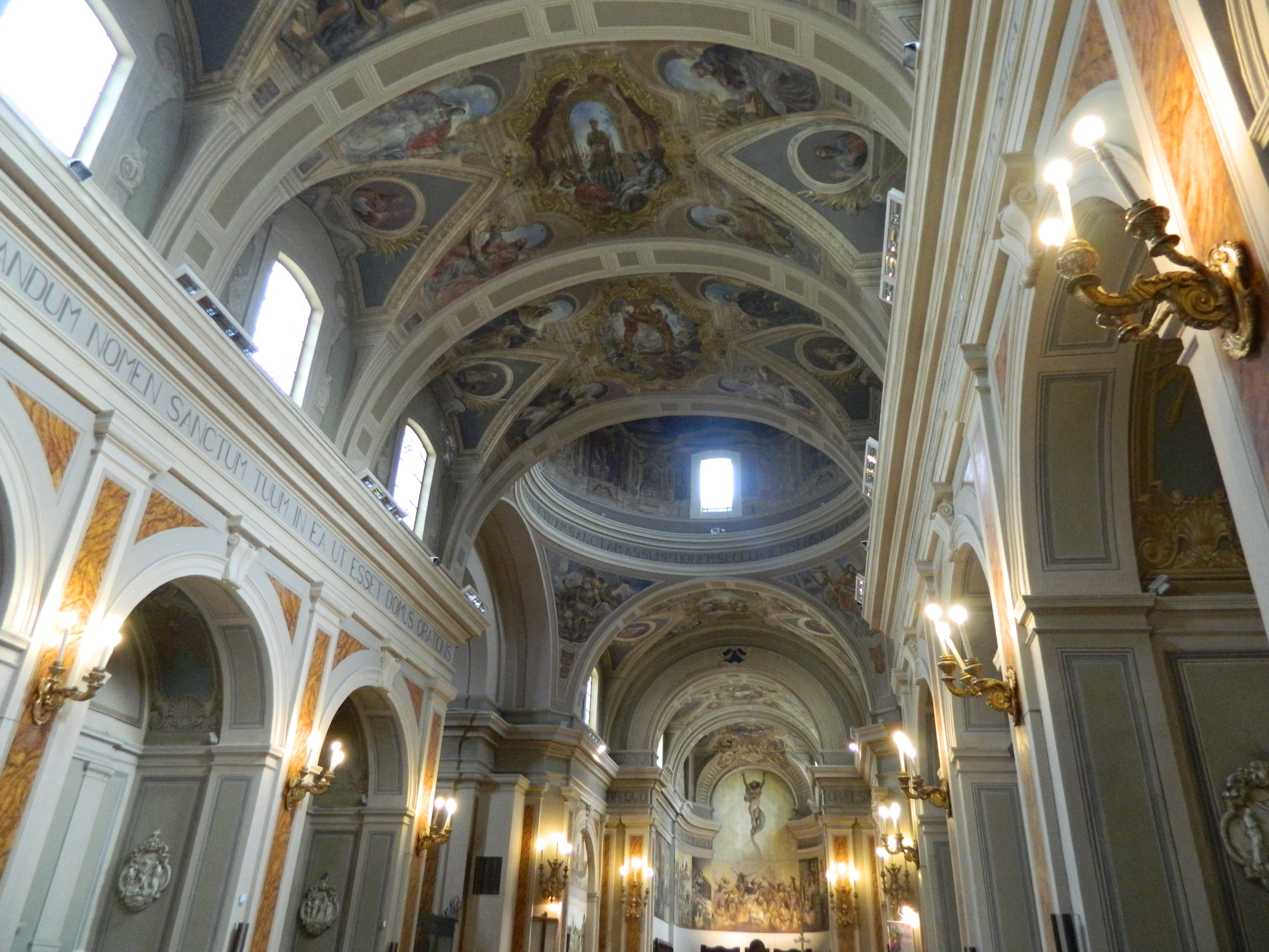 Cattedrale di San Gerardo (Potenza) - Interno